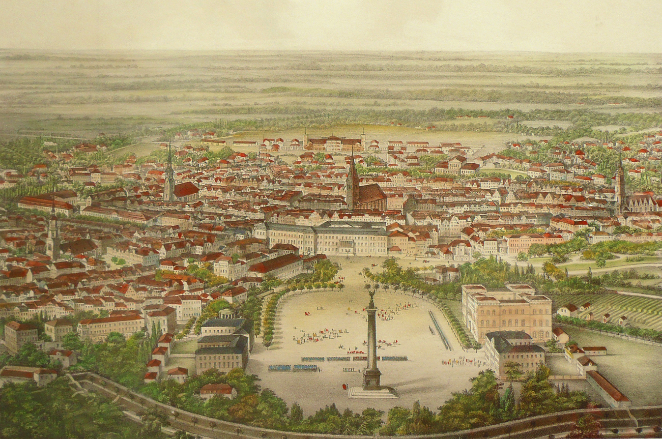 Hannover aus der Vogelperspektive um 1850